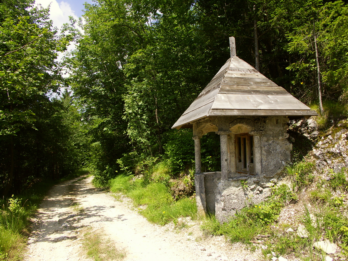 Kapelica med Brdarjem in Čebejem v Gorenji Trebuši.